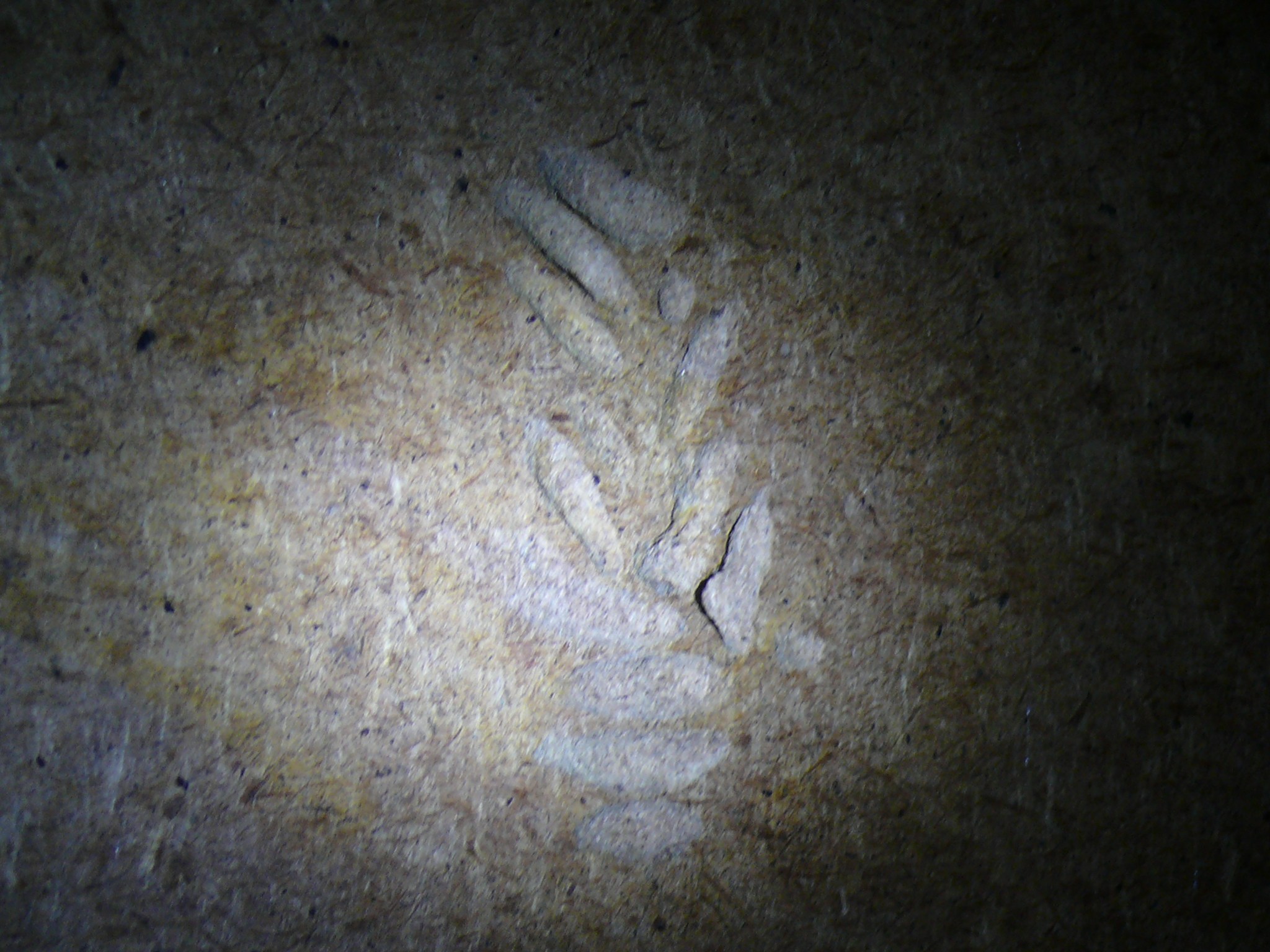 Kurze vor dem Verpuppen nagen die Wachsmottenlarven körpergerechte Mulden (meist in Holz). Beis starkem Befall ergeben sich dadurch Benutzungseinschränkungen der zur Verpuppung ausgewählten Objekte.